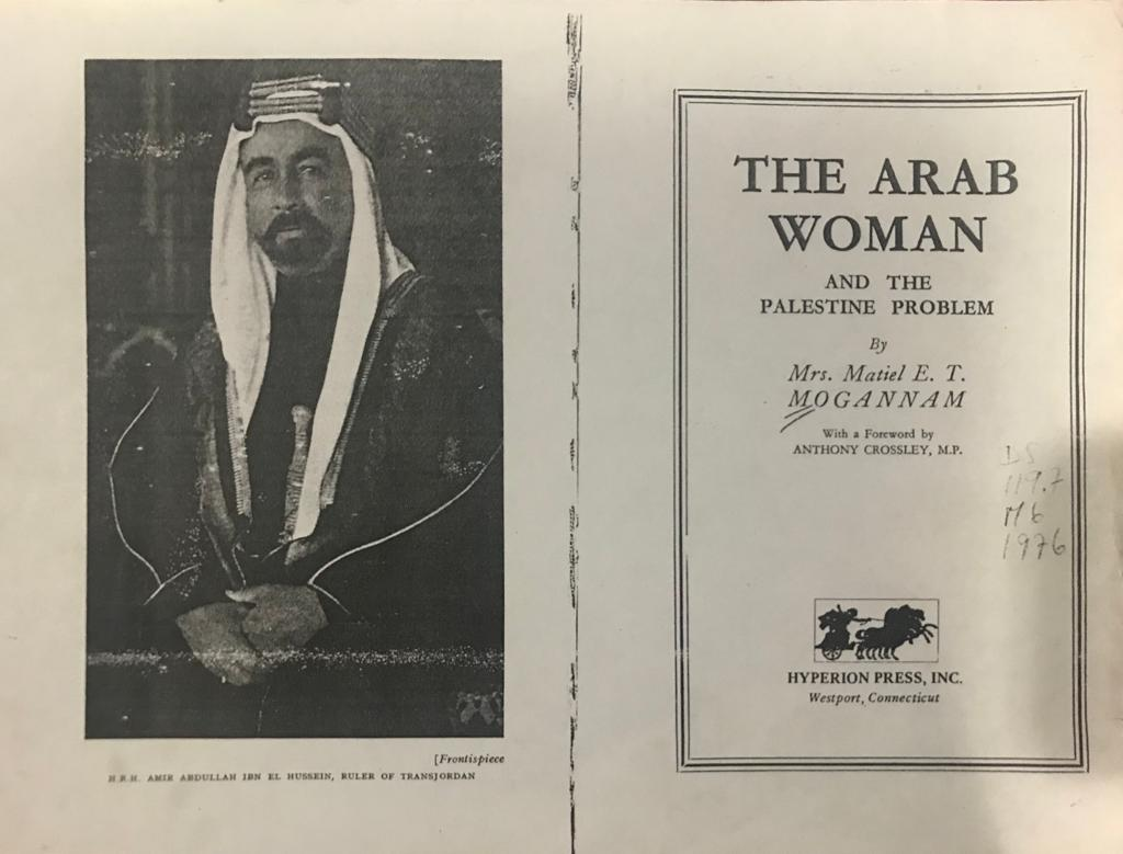 Portada del libro "The arab woman and the palestinian problem#